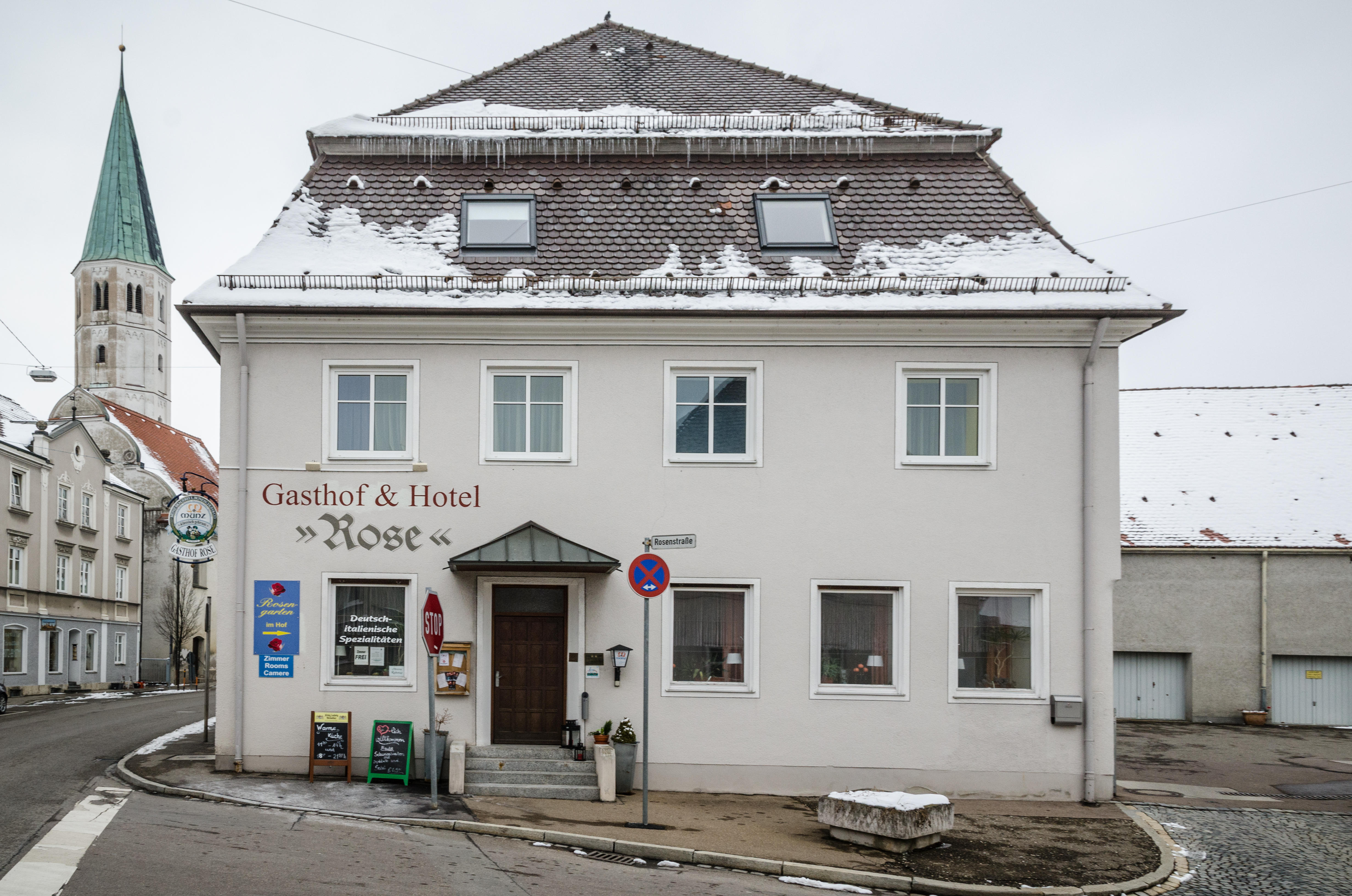 Lauingen, Herzog-Georg-Straße 4